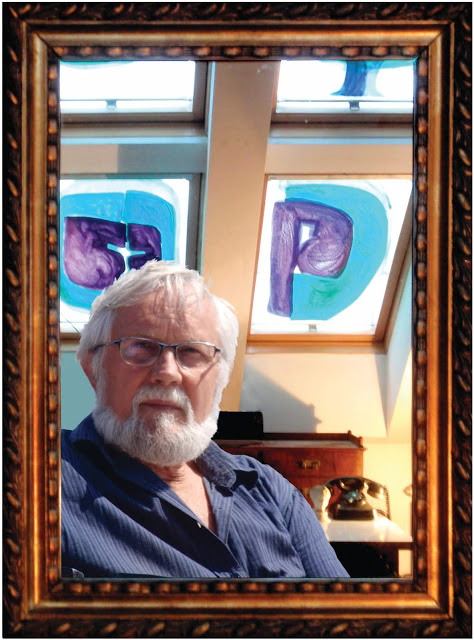 Autoportret